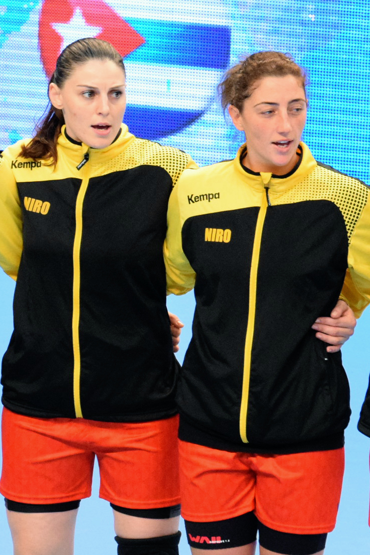 Luciana Marin et Patricia Vizitiu Le 29 novembre 2015, lors du match Roumanie / Cuba pour le compte du TIPIFF 2015. Au stade Pierre de Coubertin à Paris.